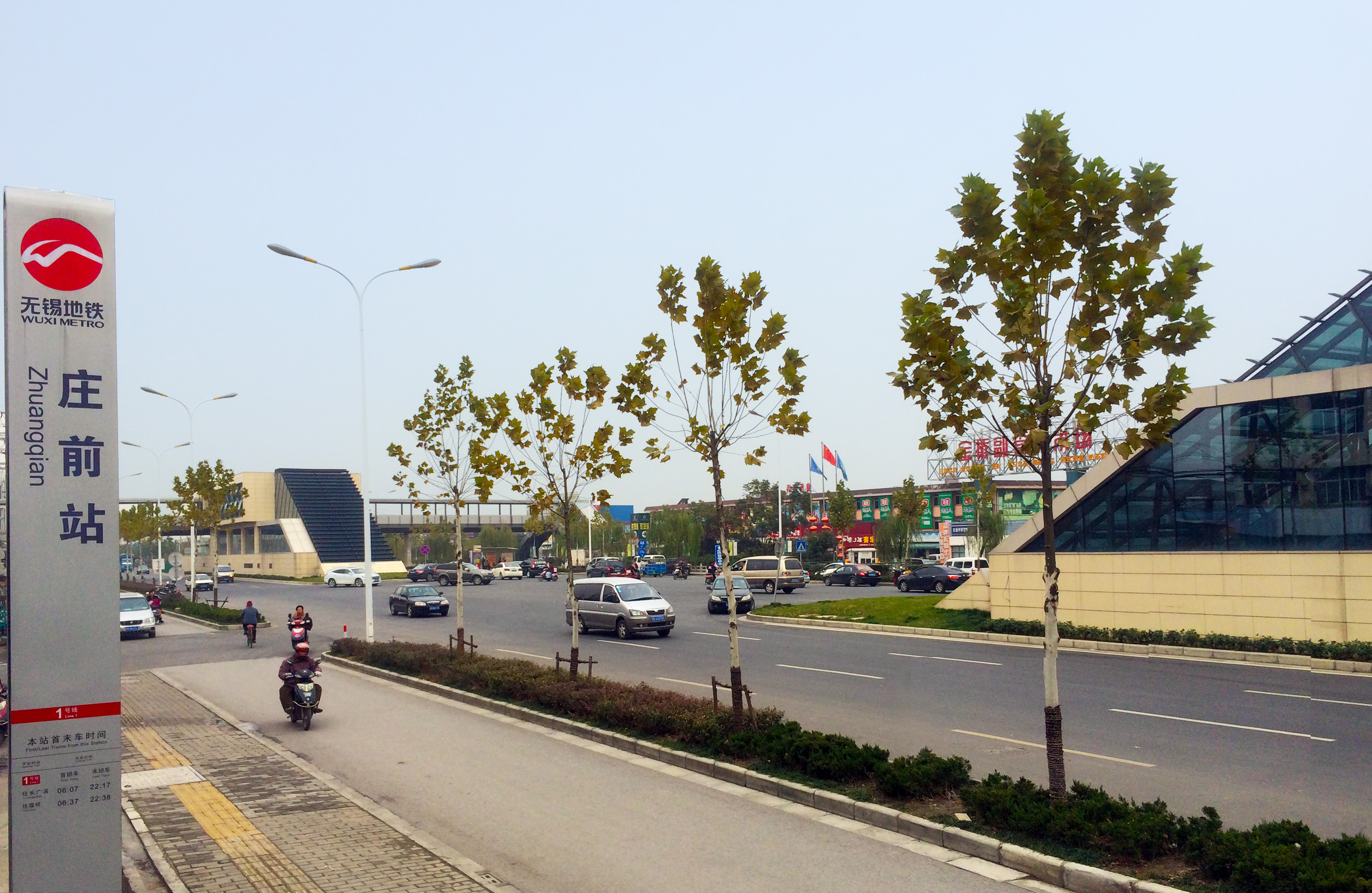 無錫地鐵1號線莊前站